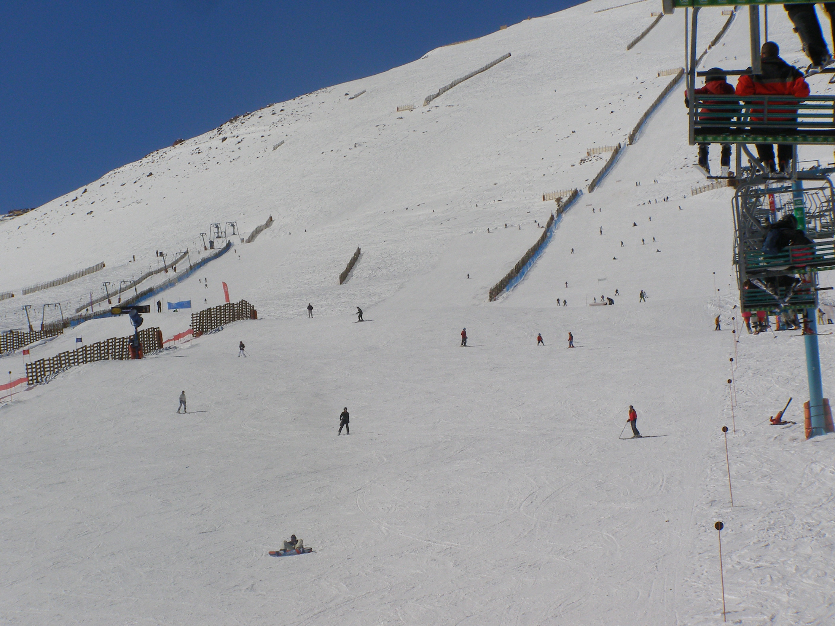 El Colorado